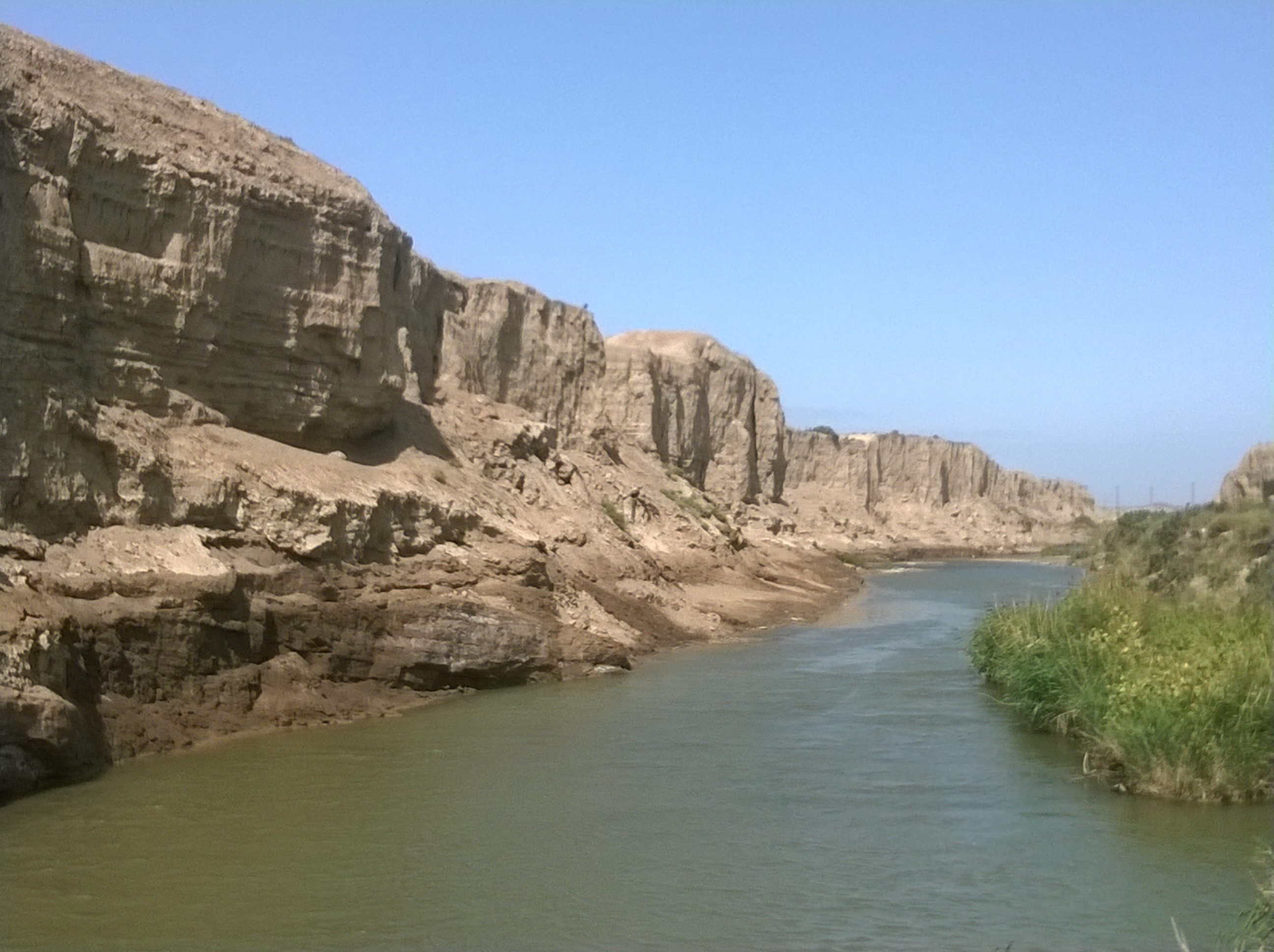 Sumqayıtçay